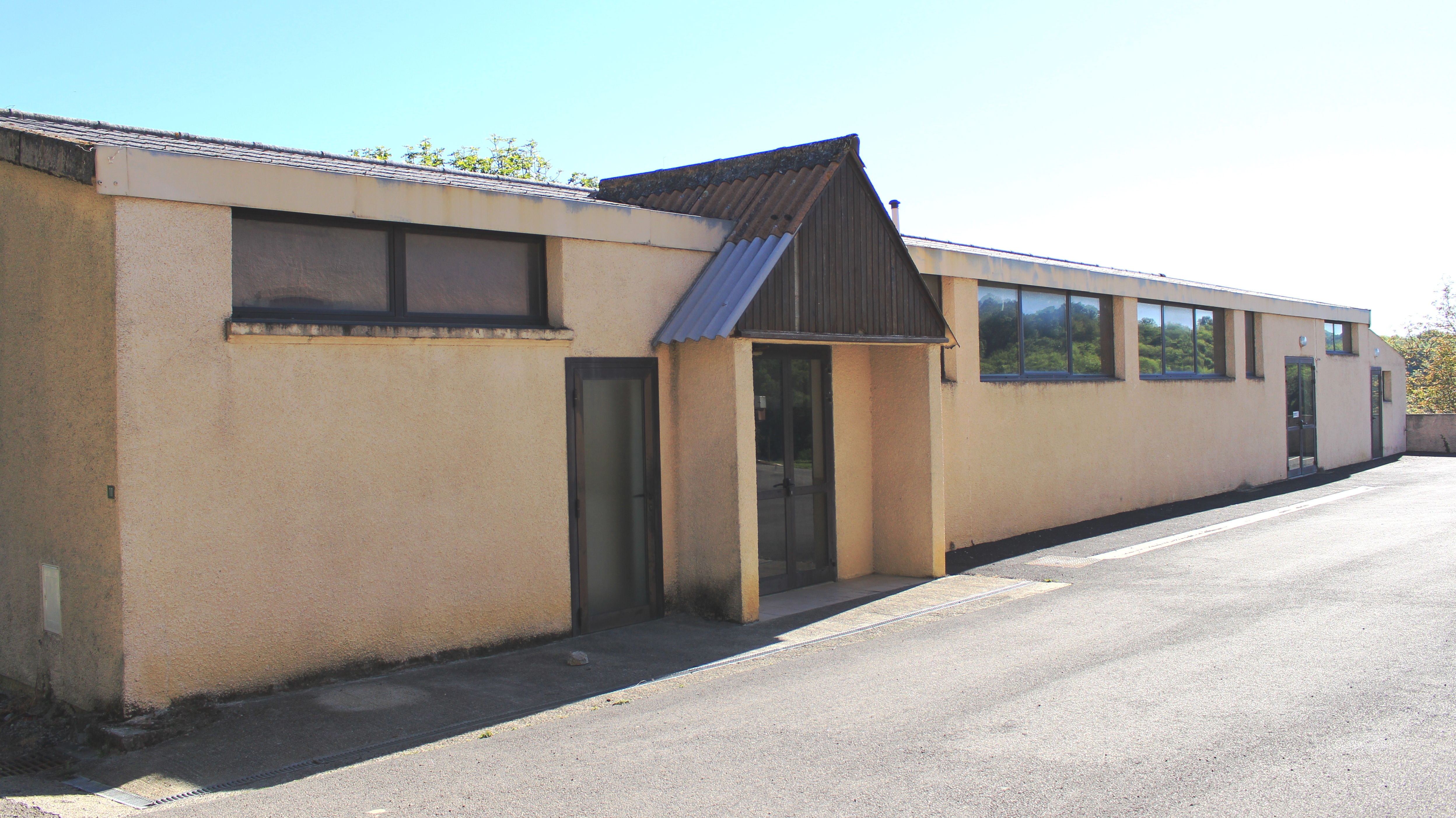 Salle des fêtes de Mun (Hautes-Pyrénées)